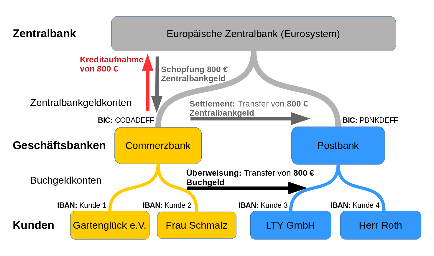 Frau Schmalz überweist 800€ Buchgeld an die LTY GmbH. Falls nicht vorhanden muss die Commerzbank nun 800€ Zentralbankgeld von der Zentralbank beschaffen und an die Postbank auf deren Zentralbankgeldkonto transferieren (Clearing).